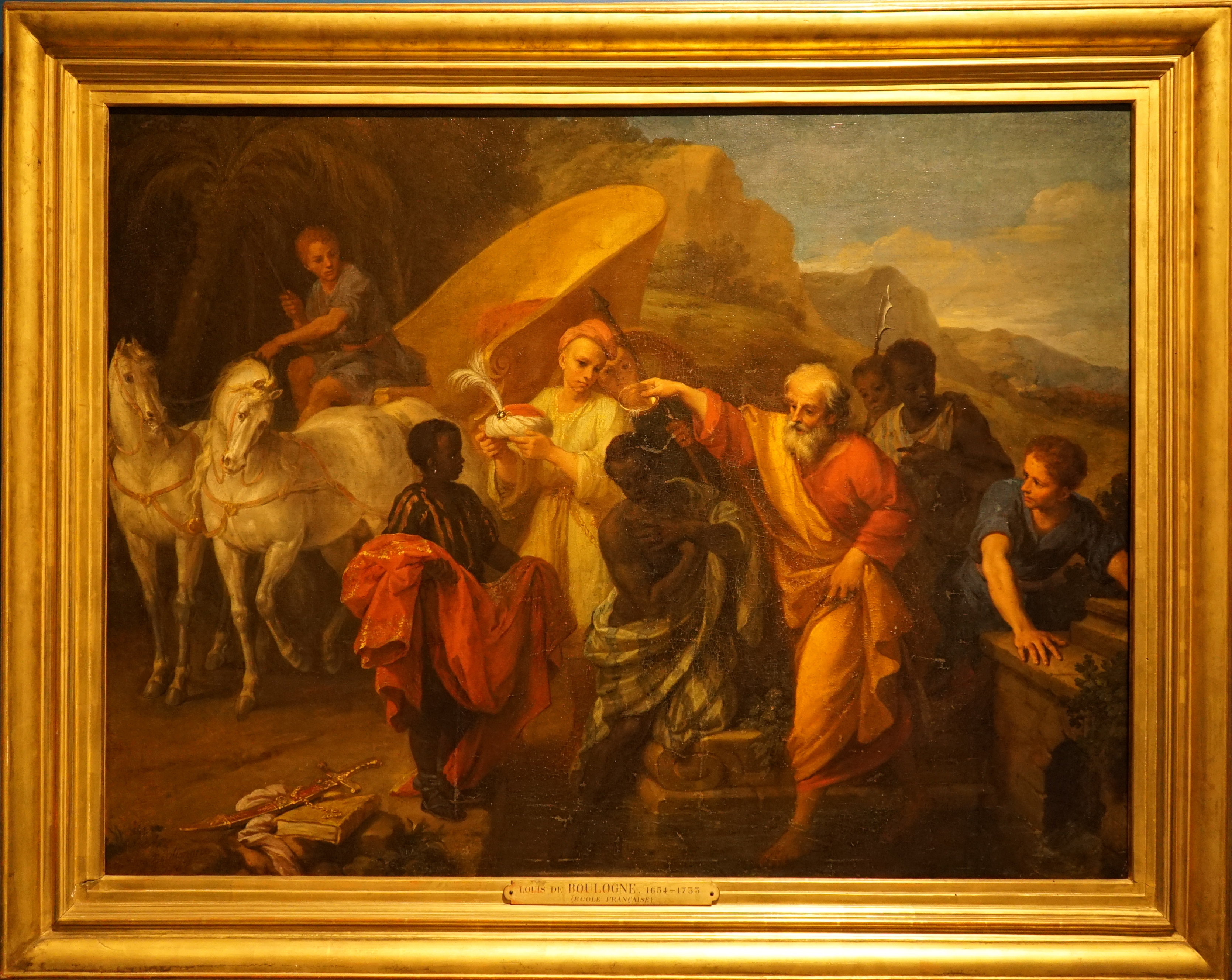 Baptème de l'eunuque de Candace